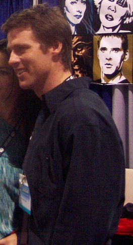 Ben Browder